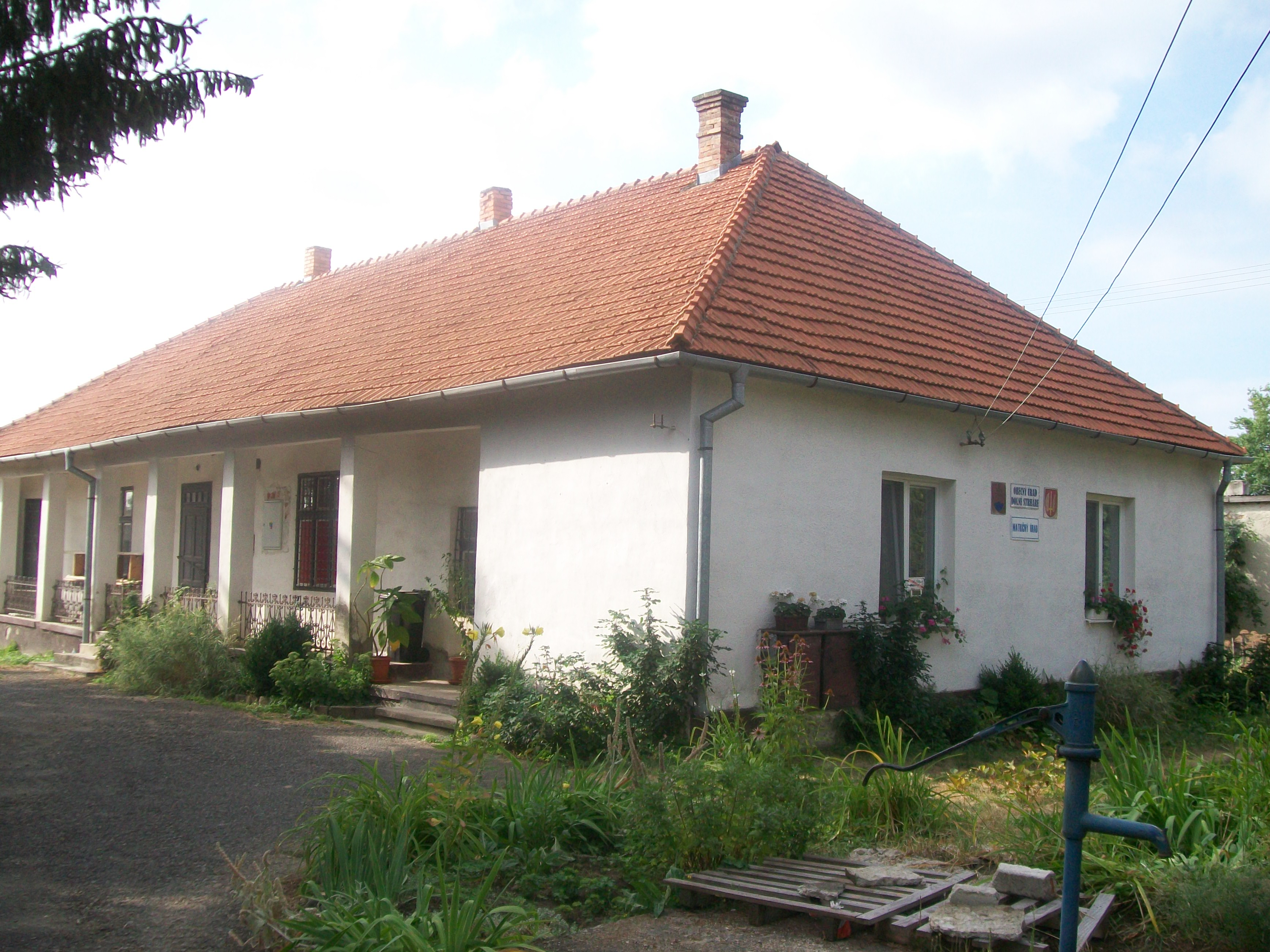 Obecný úrad v Dolných Strhároch